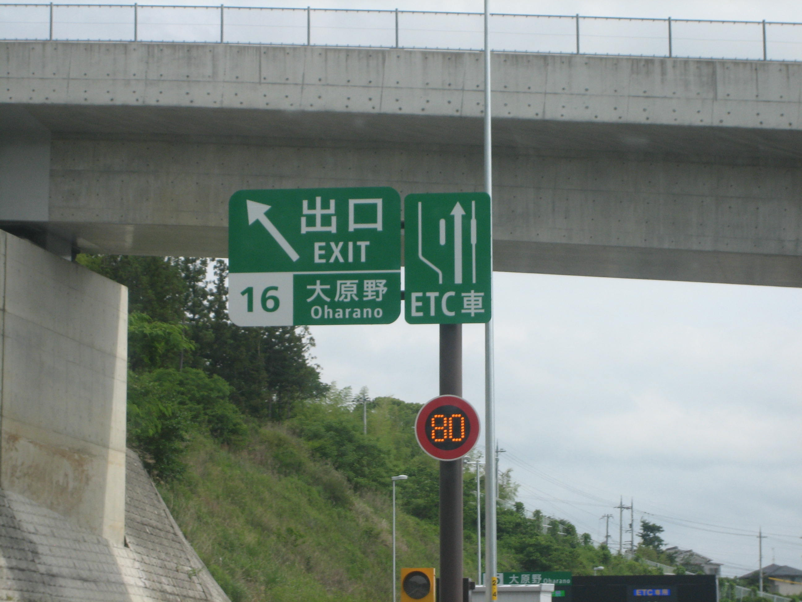 大原野IC